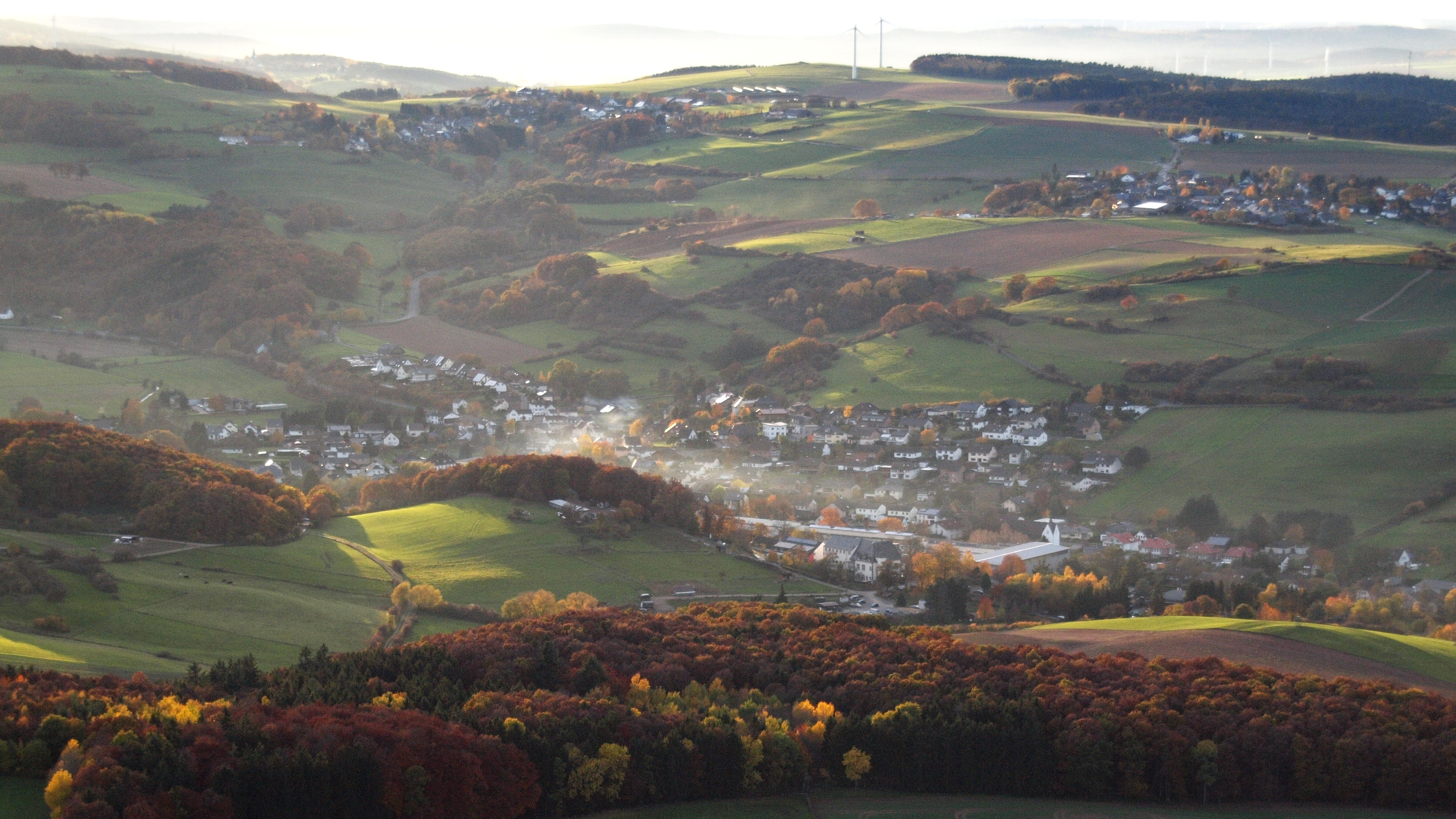 Vussem, Luftaufnahme (2015)